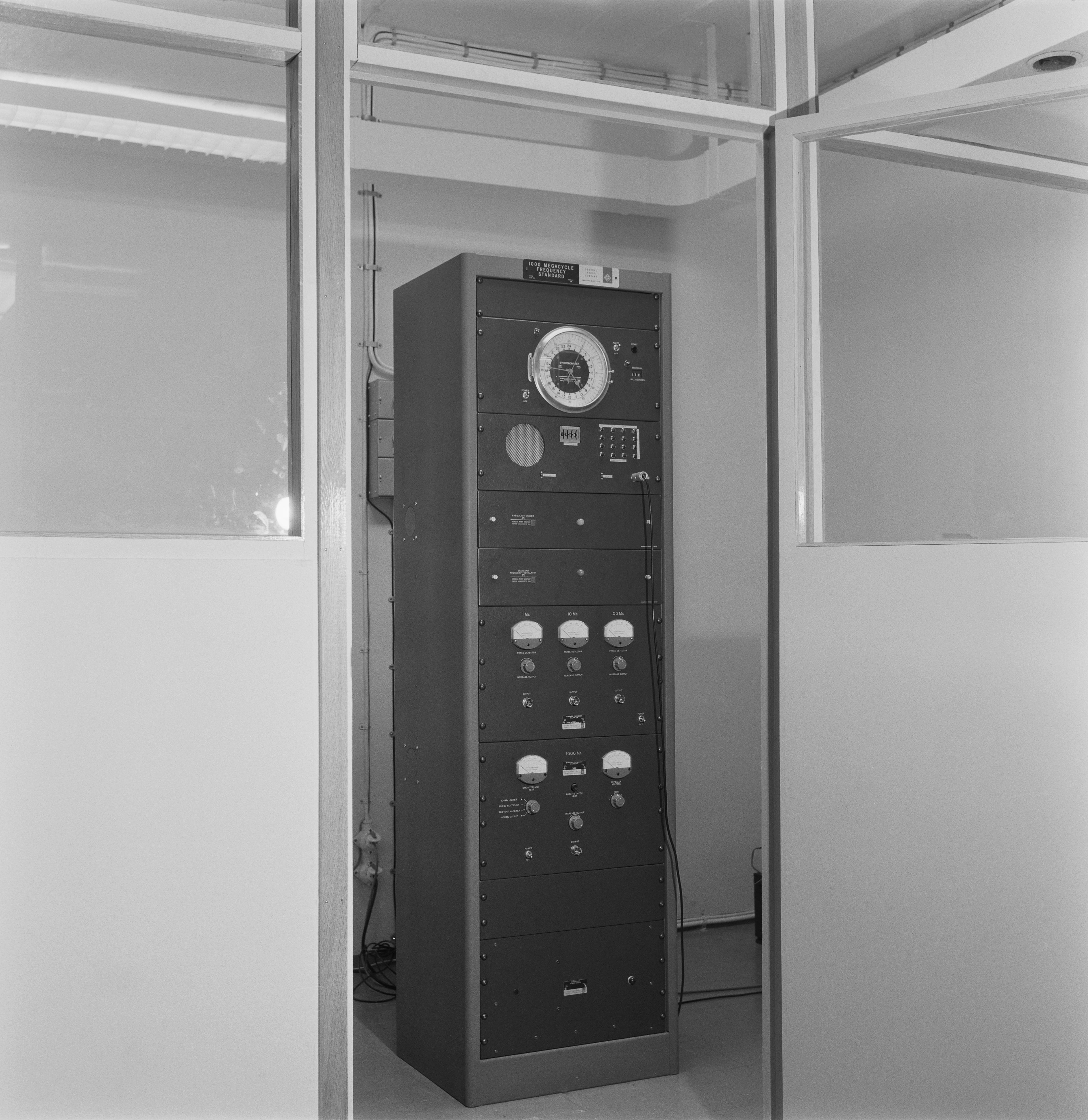 Radion aikamerkkilaite. Tiedätkö jotain tästä kuvasta? Jätä kommentti tai ota yhteyttä sähköpostitse: Tutustu Ylen arkistosisältöihin: Fler skatter från Yles arkiv: More about Yle, the Finnish Broadcasting Company